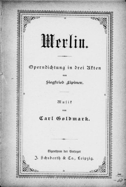 A Merlin első kiadásának címlapja.